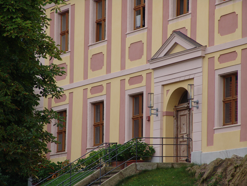 Detailansicht vom Schloß Hardeck